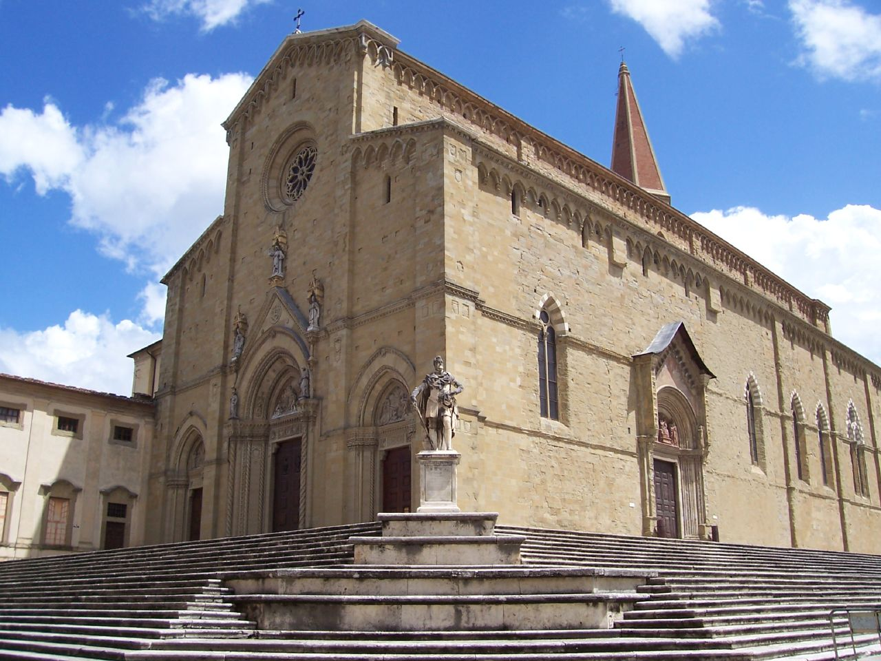 Arezzo, Toscana, ItaliaArezzo's Duomo